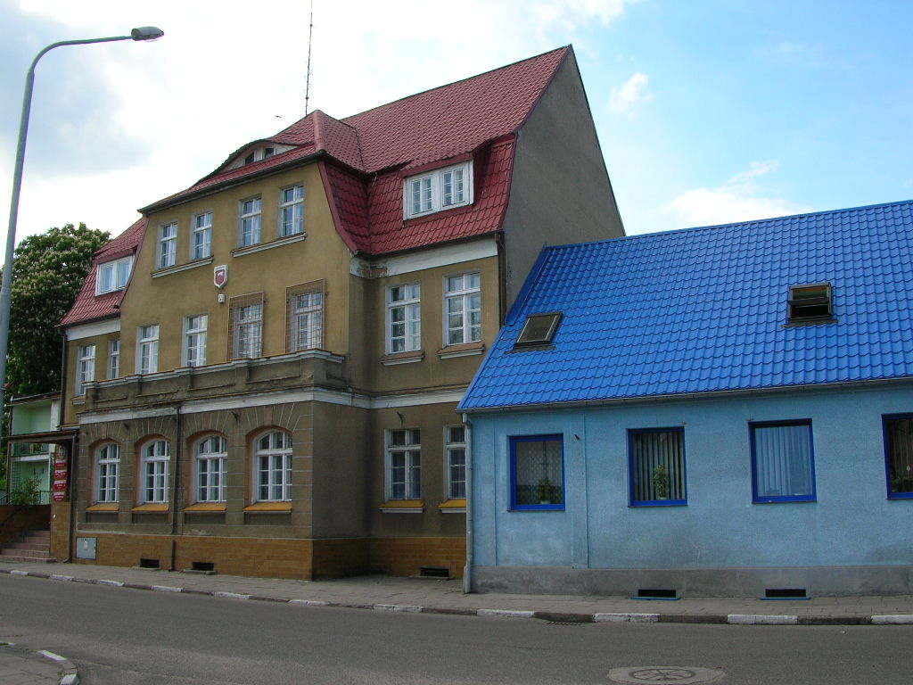 Krajenka - Ratusz - siedziba Urzędu Miasta Autor - Bartek Wawraszko